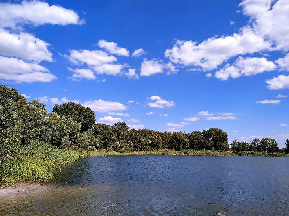 Озеро Стибин, розташоване біля села Савин Козелецького району Чернігівсьої області